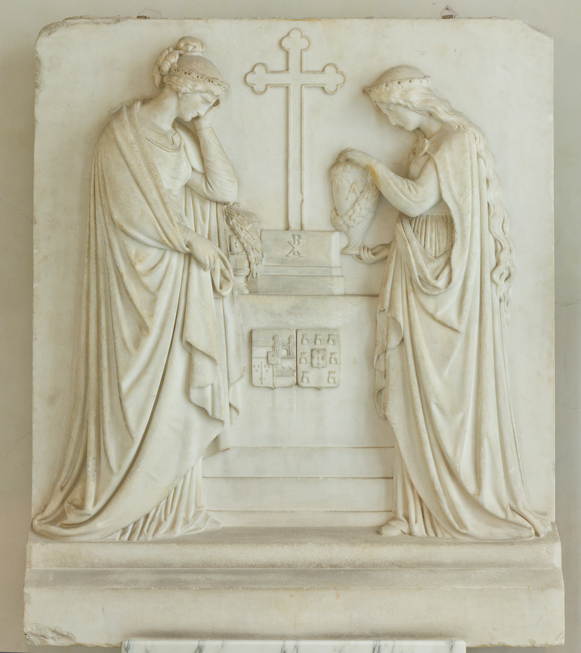 Wikipedia im Landtag – Bayern 17. bis 19. Juli 2012 in MünchenDieses Foto wurde im Rahmen des Projektes „Wikipedia im Landtag“ erstellt.